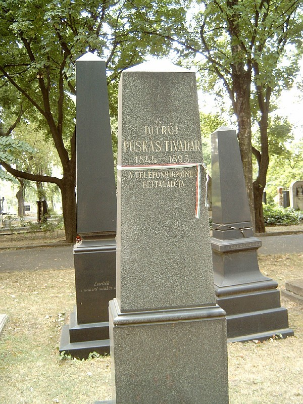 Puskás Tivadar (Pest, 1844. szept. 17. – Bp., 1893. márc. 16.): a telefonközpont és a telefonhírmondó feltalálója sírja Budapesten. Kerepesi temető: 34/1-2-2.